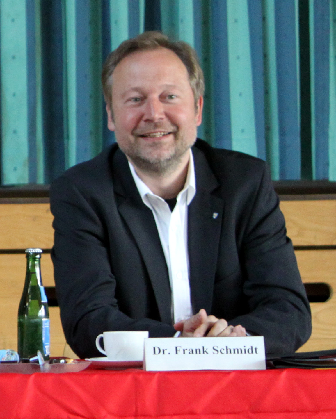 Frank Schmidt auf der Delegiertenkonferenz des SPD Unterbezirks Limburg-Weilburg am 17. Mai 2014 in Beselich-Schupbach.